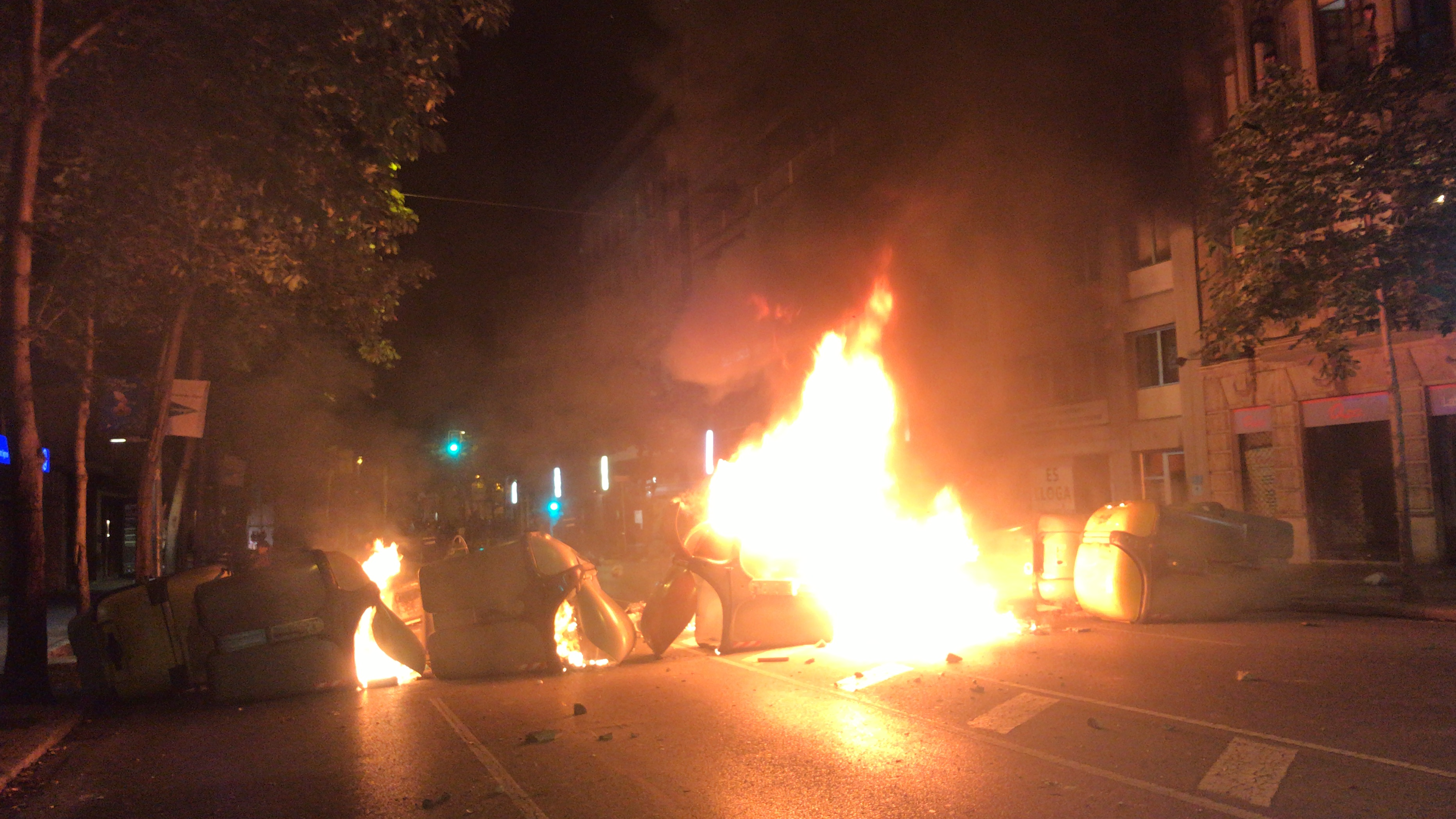 Protestes, aldarulls i càrregues el dimecres 16 d'octubre de 2019. Filera de contenidors cremant a la Gran Via Jaume I